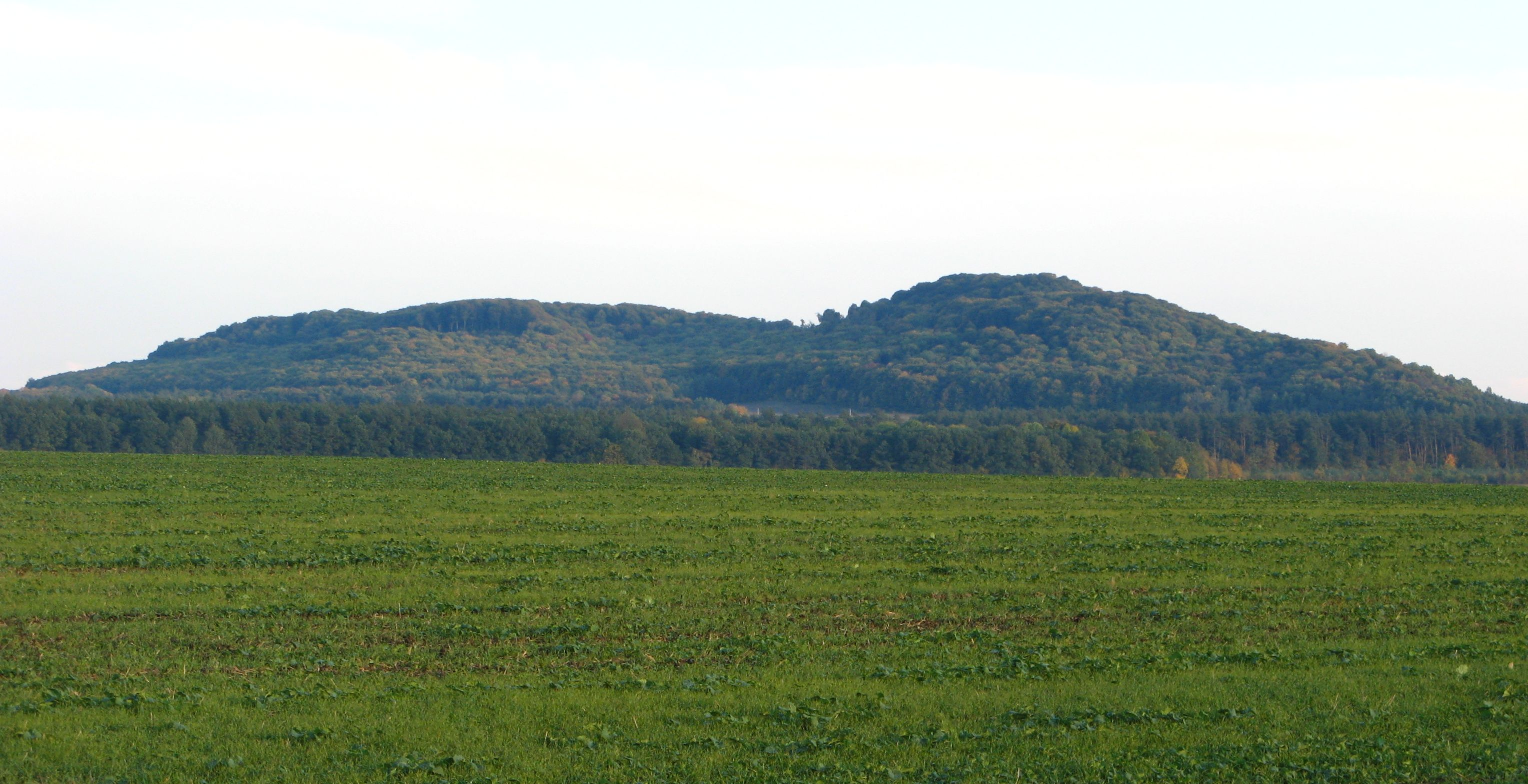 Swiata_Gore.jpg: Свята Гора (Вороняки)